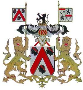 Gemeentebestuur Lennik. Lennik is een plaats en gemeente in de provincie Vlaams-Brabant